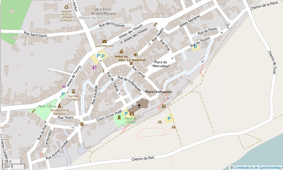 Saint-Macaire ancienne ville This map may be incomplete, and may contain errors. Don't rely solely on it for navigation.